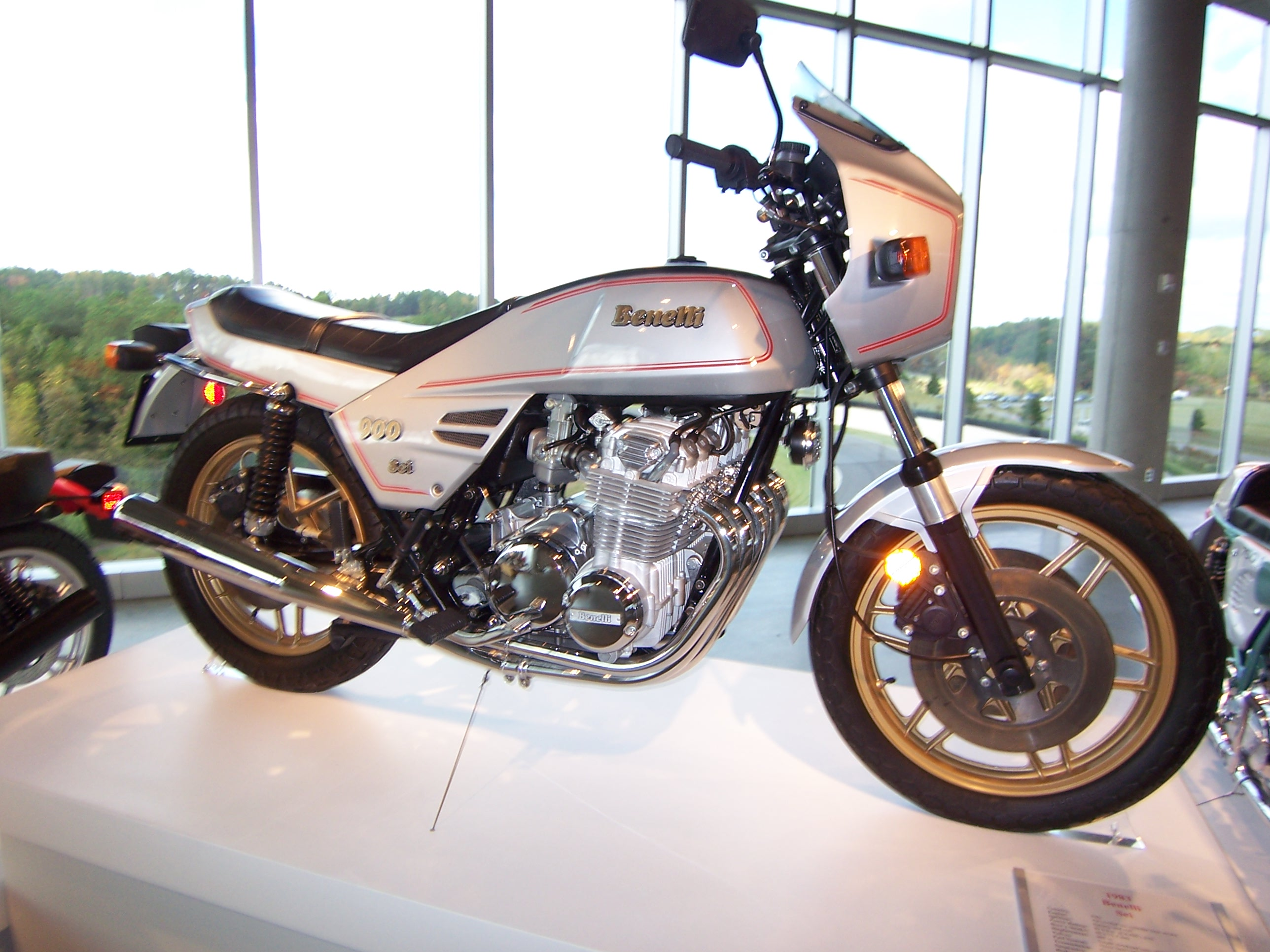 Benelli 900 Sei Sport / More description is here